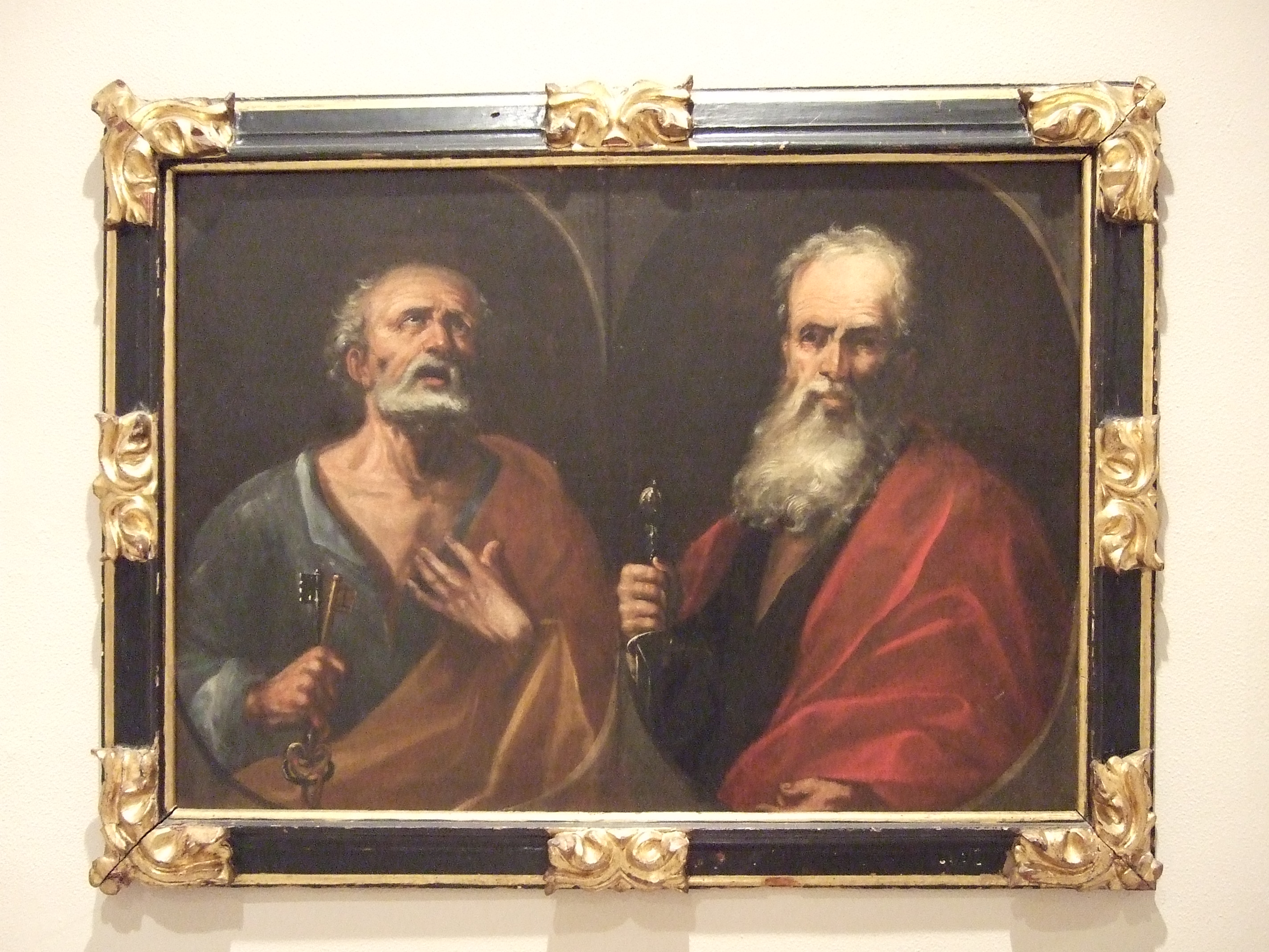 Saint Peter and Saint Paul